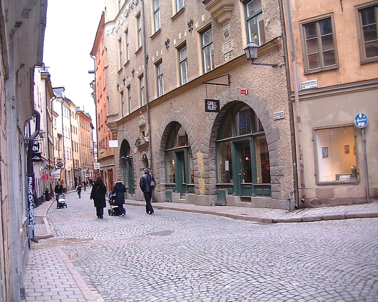 14, Östralånggatan, Gamla stan, Stockholm.